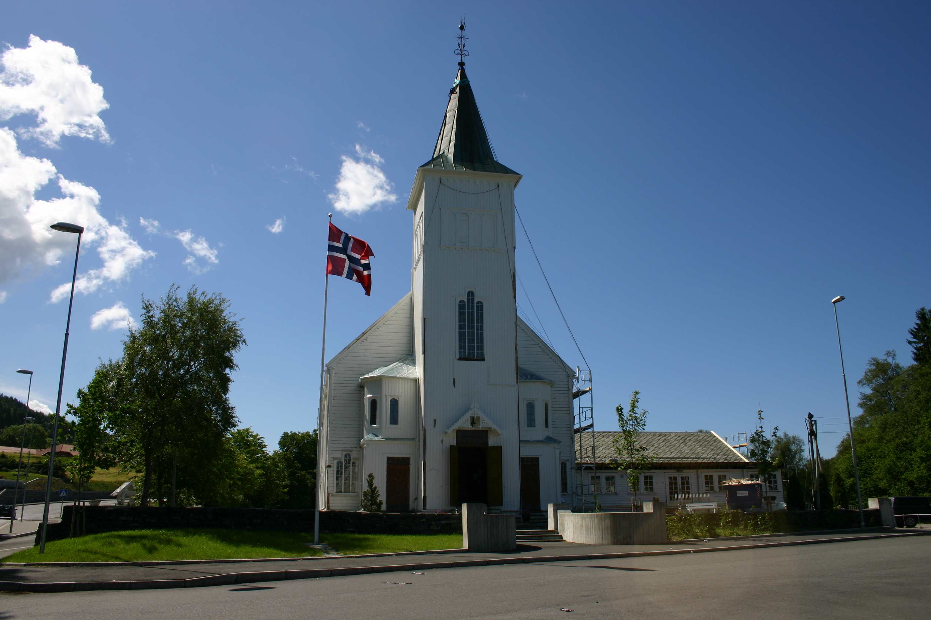 Fjell kirke